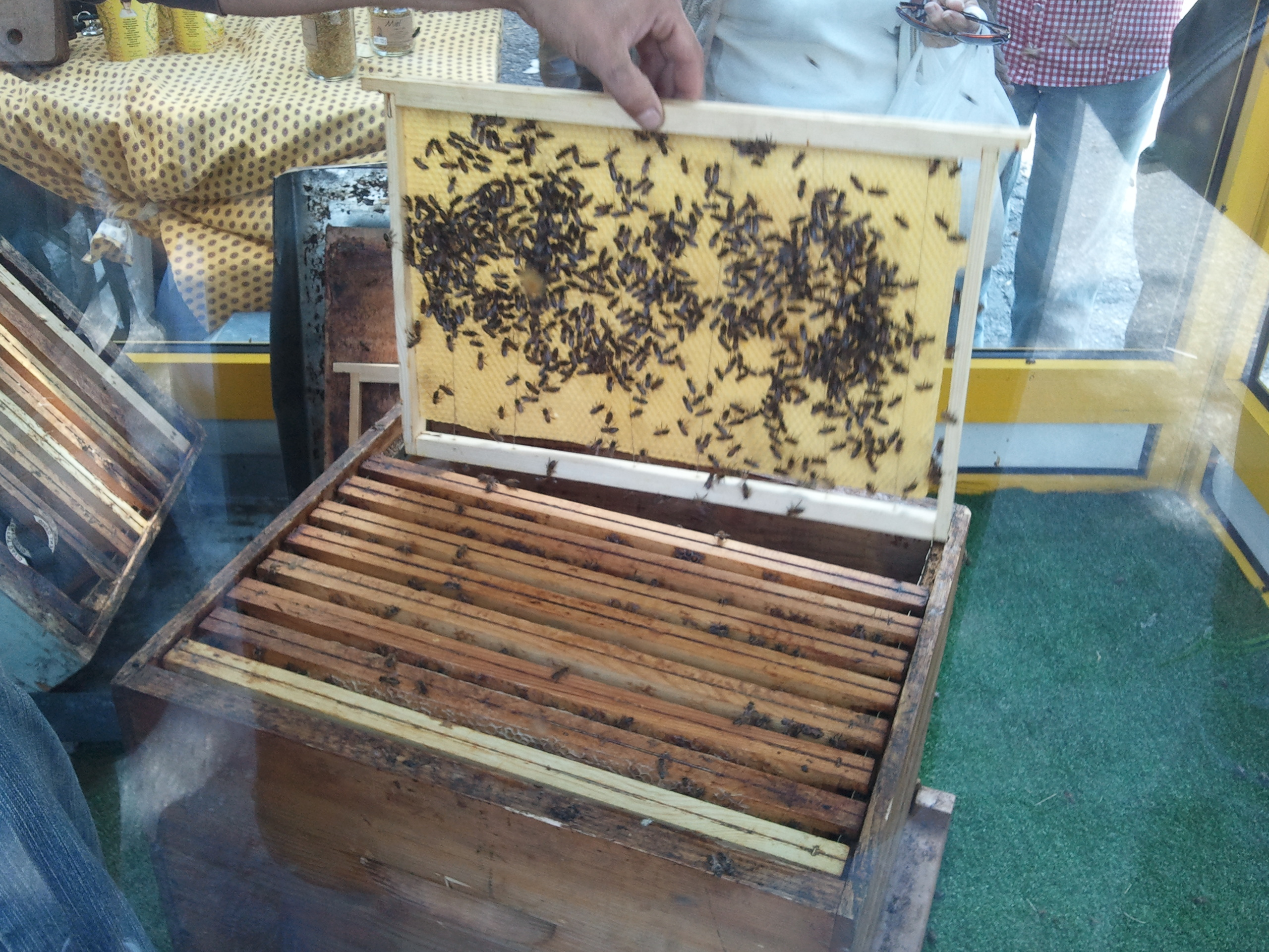 Rucher des Alpilles Saint Rémy de Provence